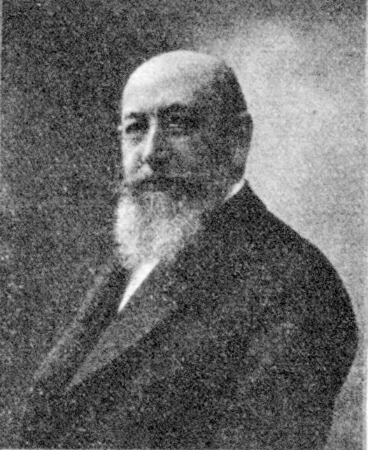 Österreichischer Politiker, Reichsratswahl 1907, Name siehe Dateiname